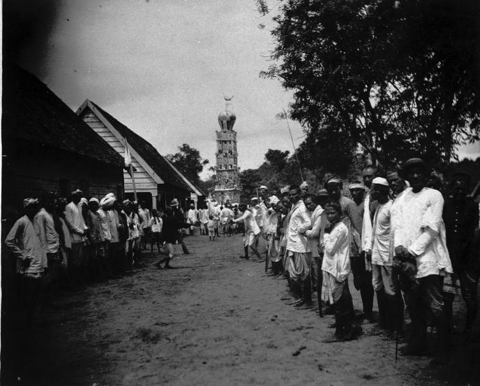 Foto. Het Tadja feest van Brits-Indische Hindoestanen.